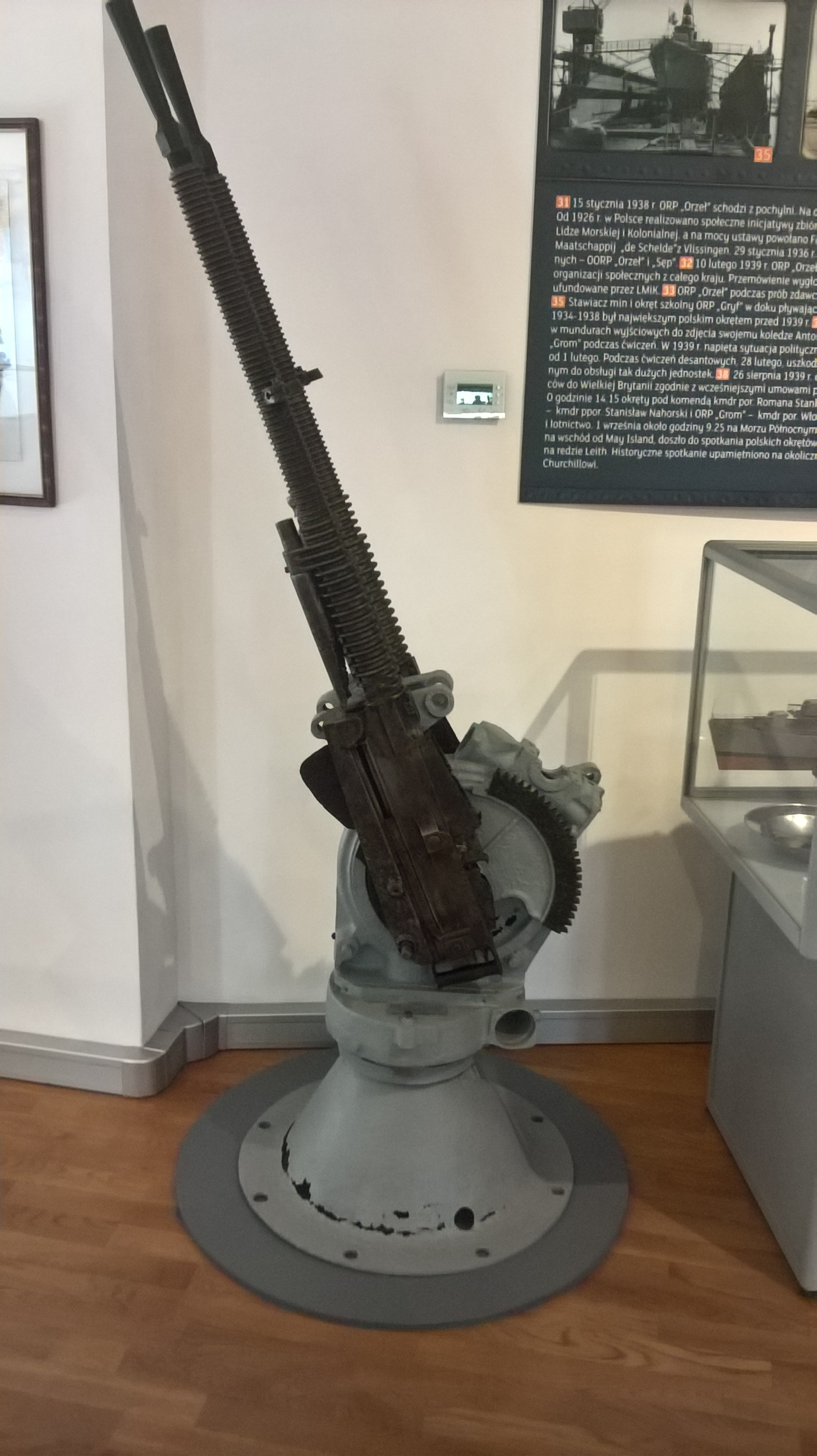 Wielkokalibrowy karabin maszynowy Hotchkiss wz. 30 kal. 13,2 mm ze stawiacza min ORP "Gryf" eksponowany w Muzeum Marynarki Wojennej w Gdyni.